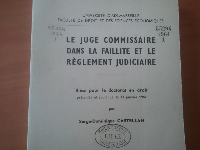 thèse pour le doctorat par S.-D. Castellan